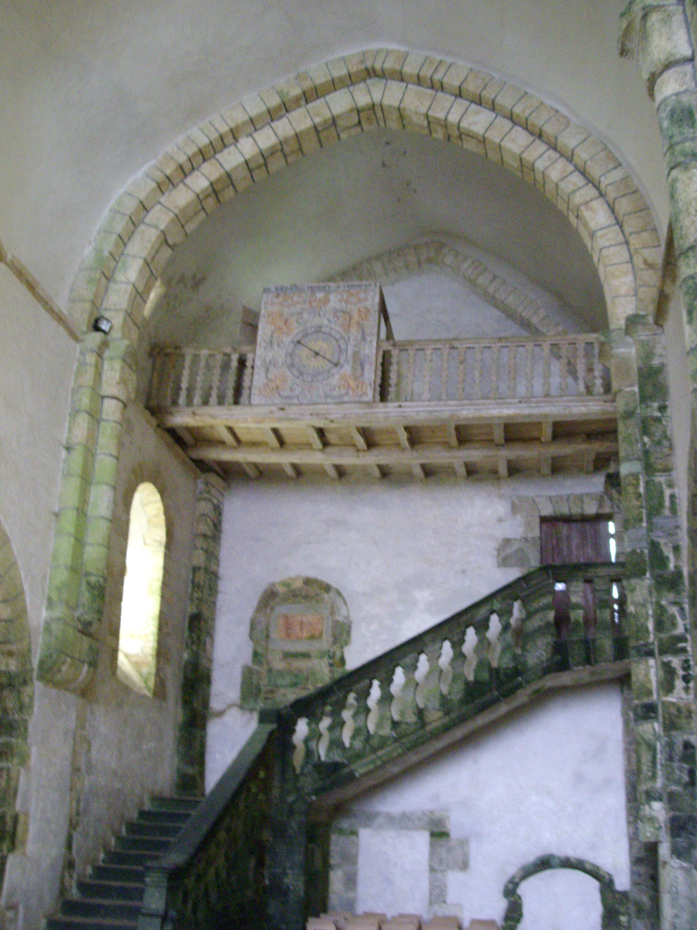 Escalier des matines sis transept nord de l'abbatiale Notre-Dame du Relec en Plounéour-Ménez (29).